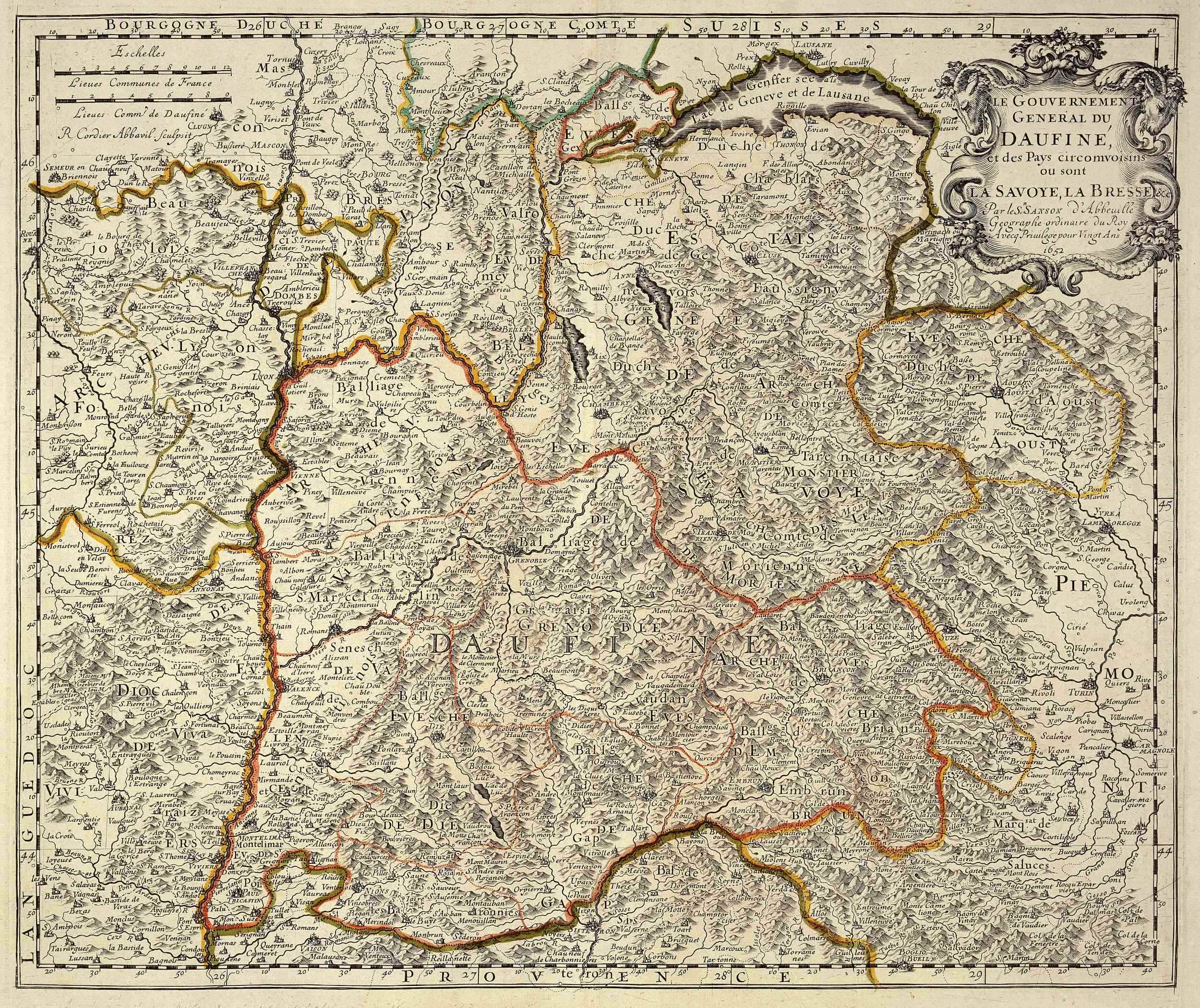 Carte du Gouvernement général du Dauphiné et des pays circomvoisins ou sont la Savoie, la Bresse, etc.. par le sieur Sanson d'Abbeville géographe ordinaire du Roy Pierre Mariette, Paris, 1652